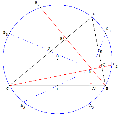 Symetriques de l'orthocentre